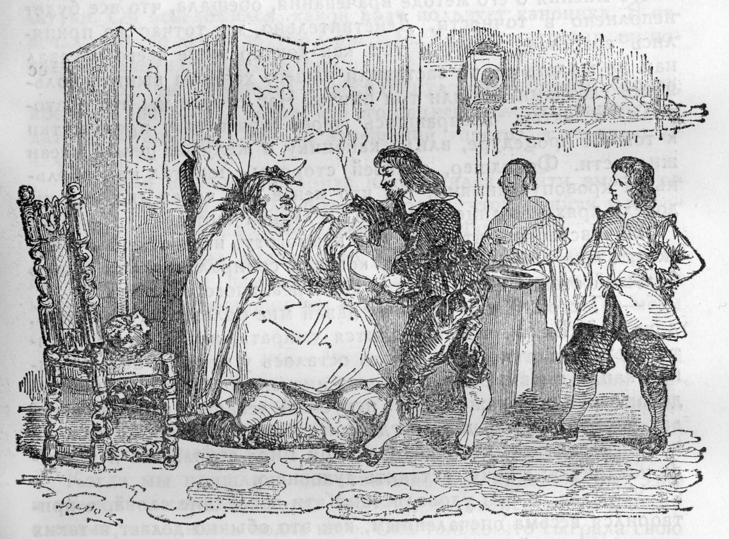 Gil_blas_novel_illustration